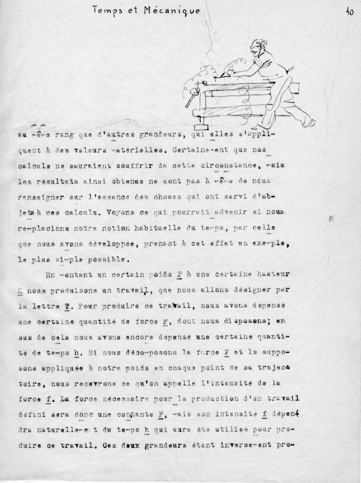 копия страницы из Essai sur la conscience universelle Льва Шульцв